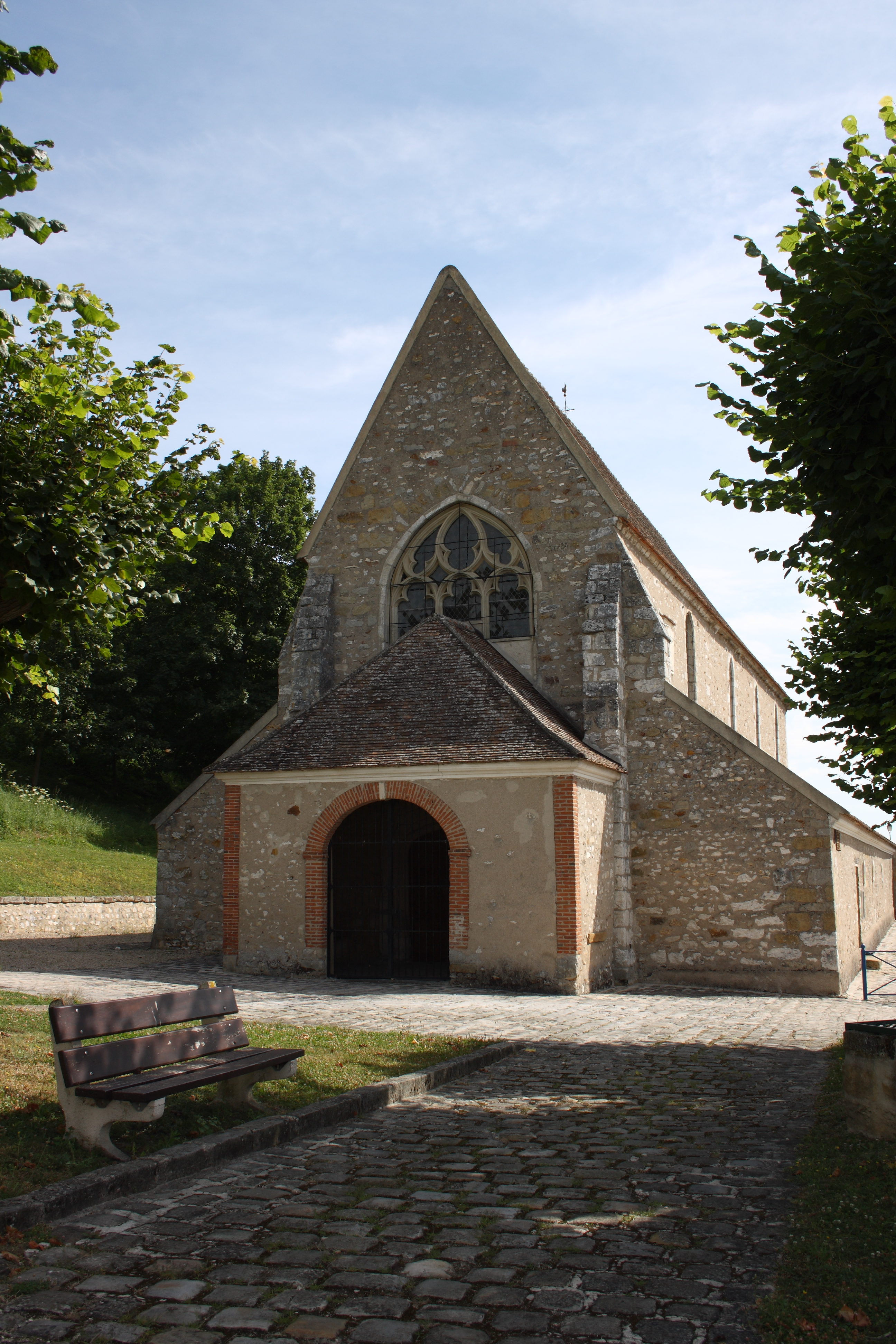 Katholische Pfarrkirche Saint-Germain in La Grande-Paroisse im Département Seine-et-Marne in der Region Île-de-France (Frankreich), Westfassade